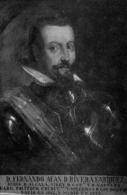 Fernando Afán de Ribera y Téllez-Girón, III Duque de Alcalá de los Gazules